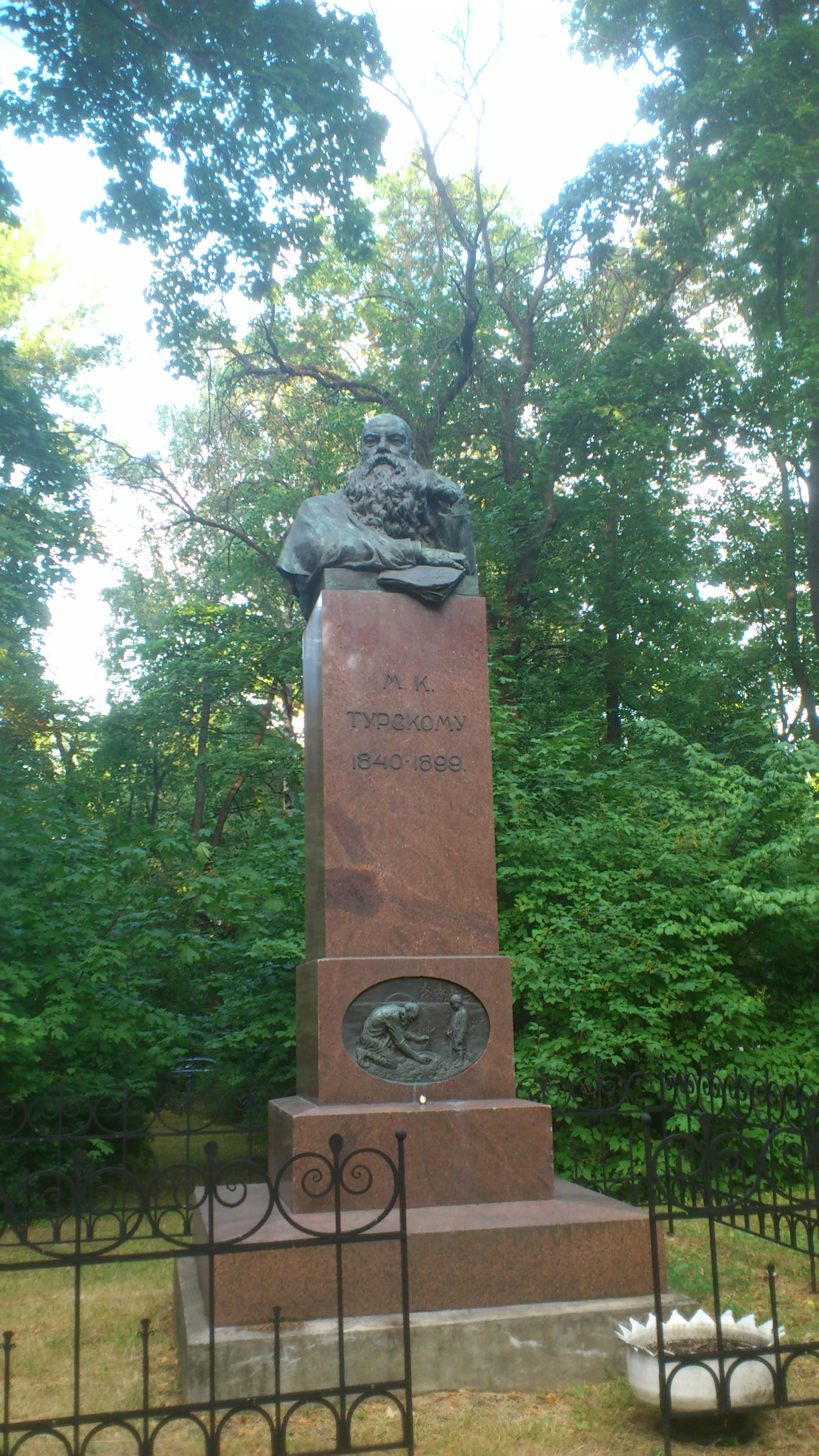 Памятник М. К. Турскому на территории МСХА им. К. А. Тимирязева. Москва, возле дома № 58 Тимирязевской улицы. Установлен 30 июля 1912 года (по старому стилю), памятник был выполнен одним из выпускников П. В. Дзюбановым.